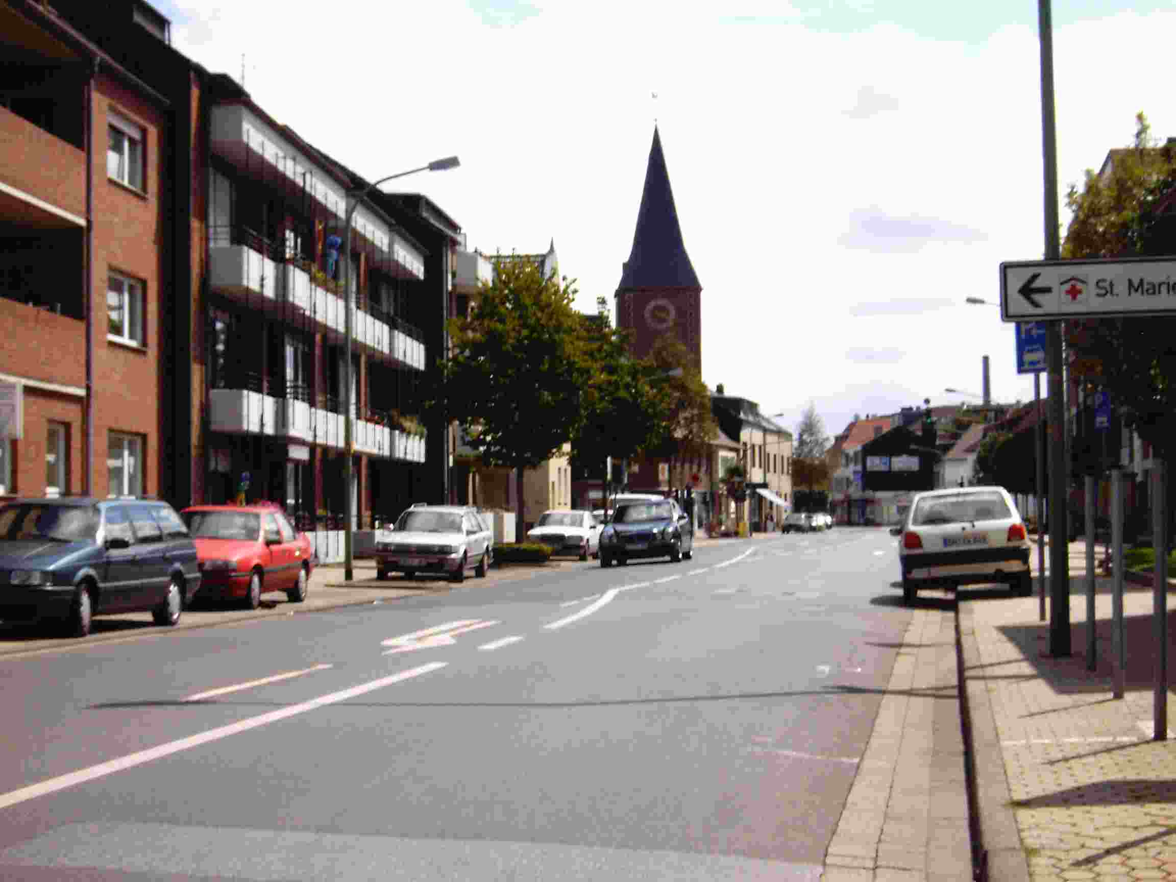 Birkesdorf (Düren), Ortsdurchfahrt own work papa1234 2006-08-13